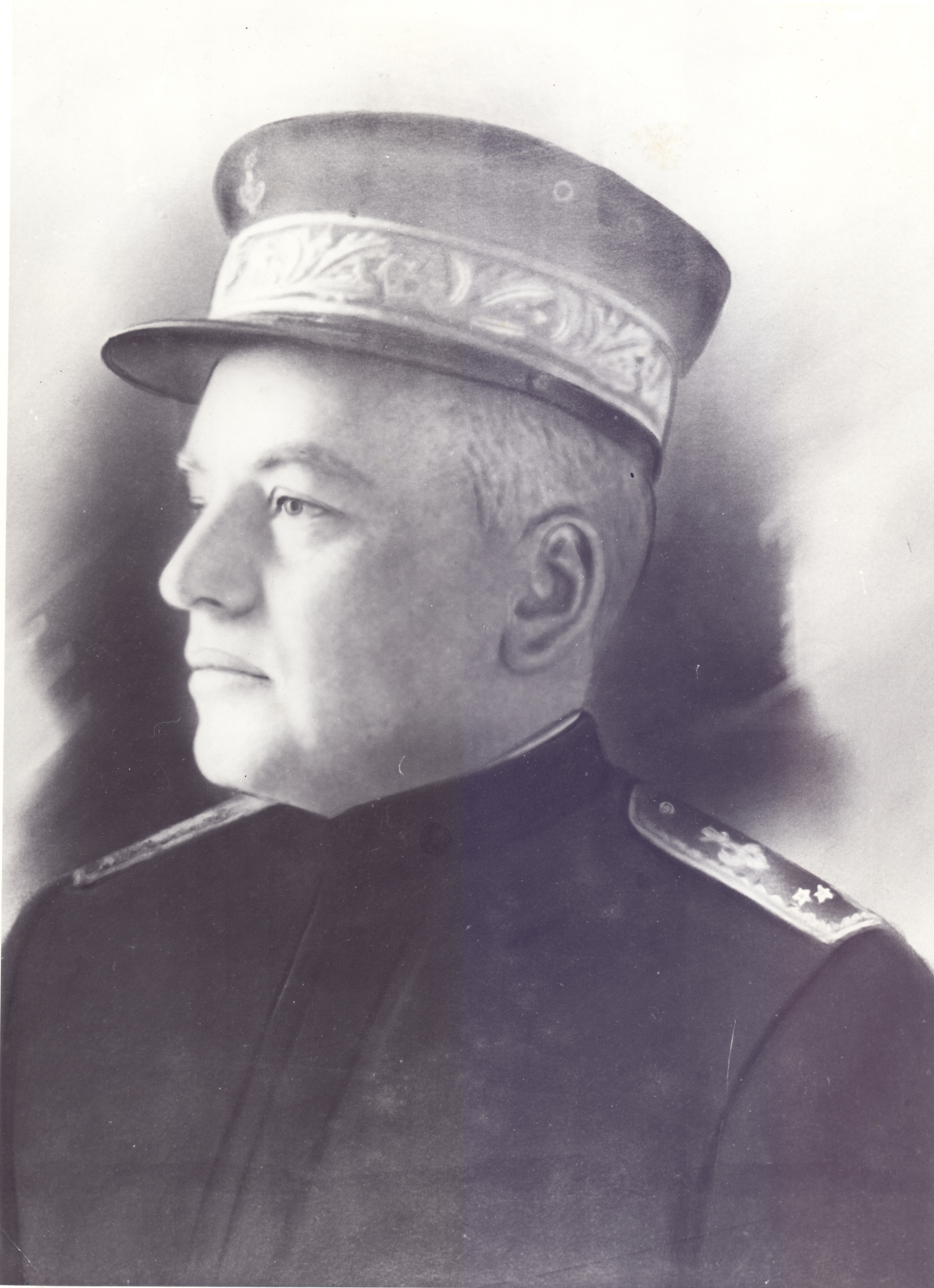 Um dos primeiros atos do Almirante Alexandrino foi a escolha do Contra-Almirante Pedro Max Fernando de Frontin para comandar a Divisão Naval em Operações de Guerra (D.N.O.G.). Era, então, um dos oficiais de maior prestígio da Marinha do Brasil. Nomeado Comandante da Divisão por decreto de janeiro de 1918, assumiu as funções desse cargo no dia 9 de fevereiro seguinte. Arquivo liberado pela Marinha do Brasil através de projeto GLAM com Wiki Educação Brasil